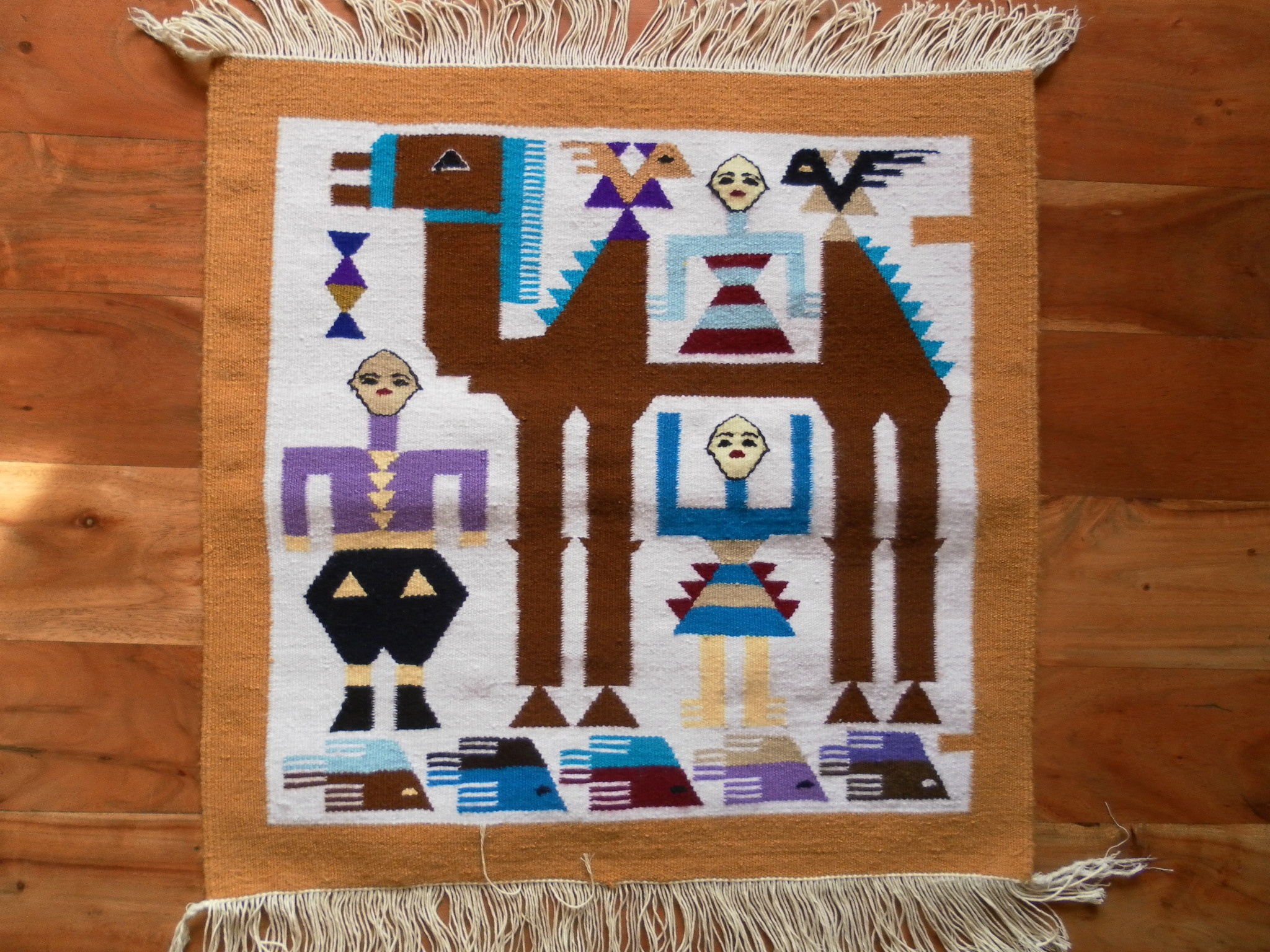 description scene de mariage Berbere